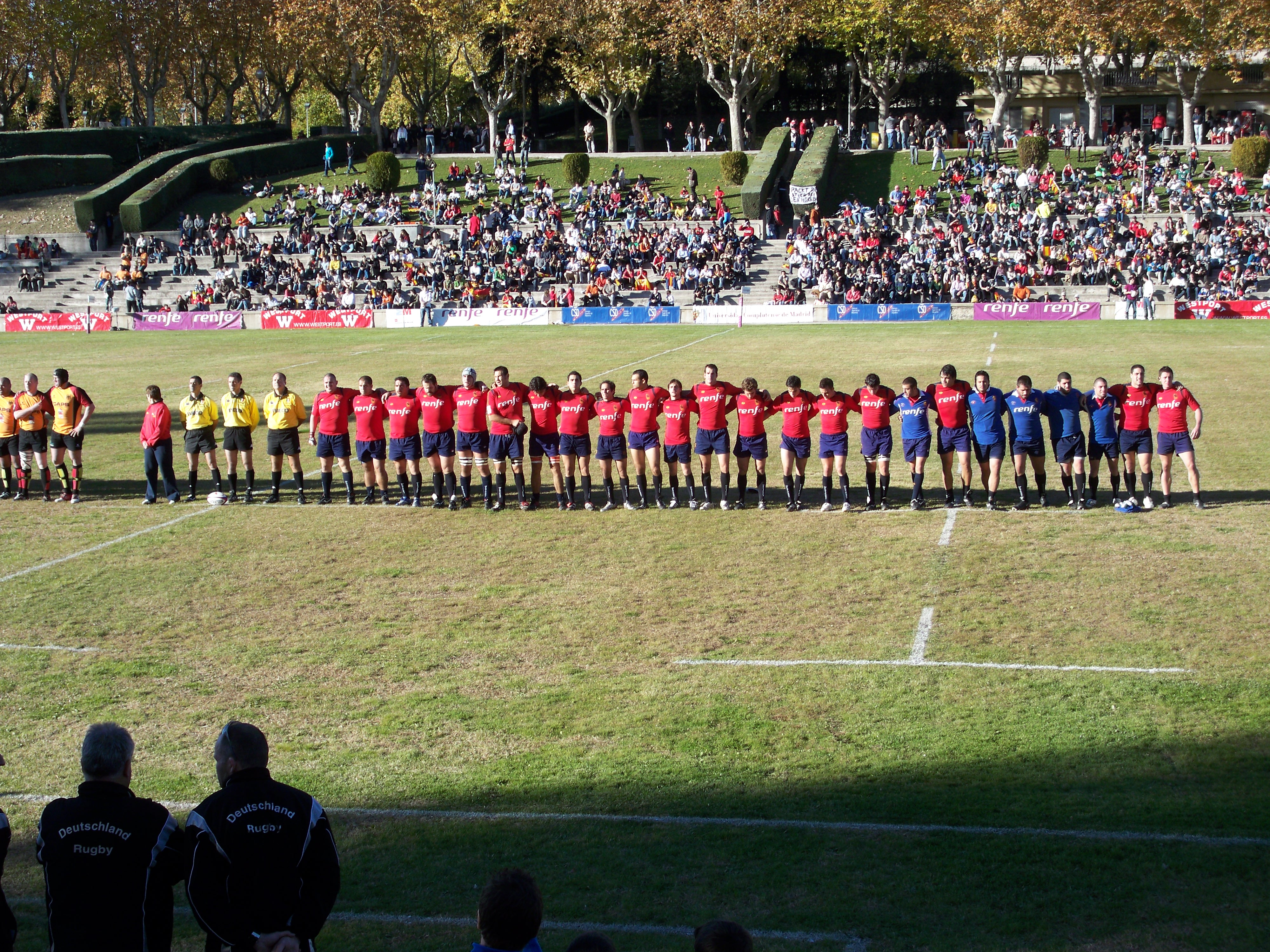 Formación española. Partido Alemania-España 6 Naciones B